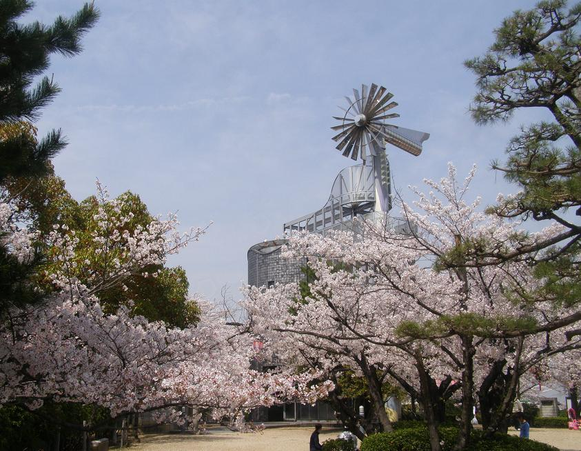 桃山公園と風車